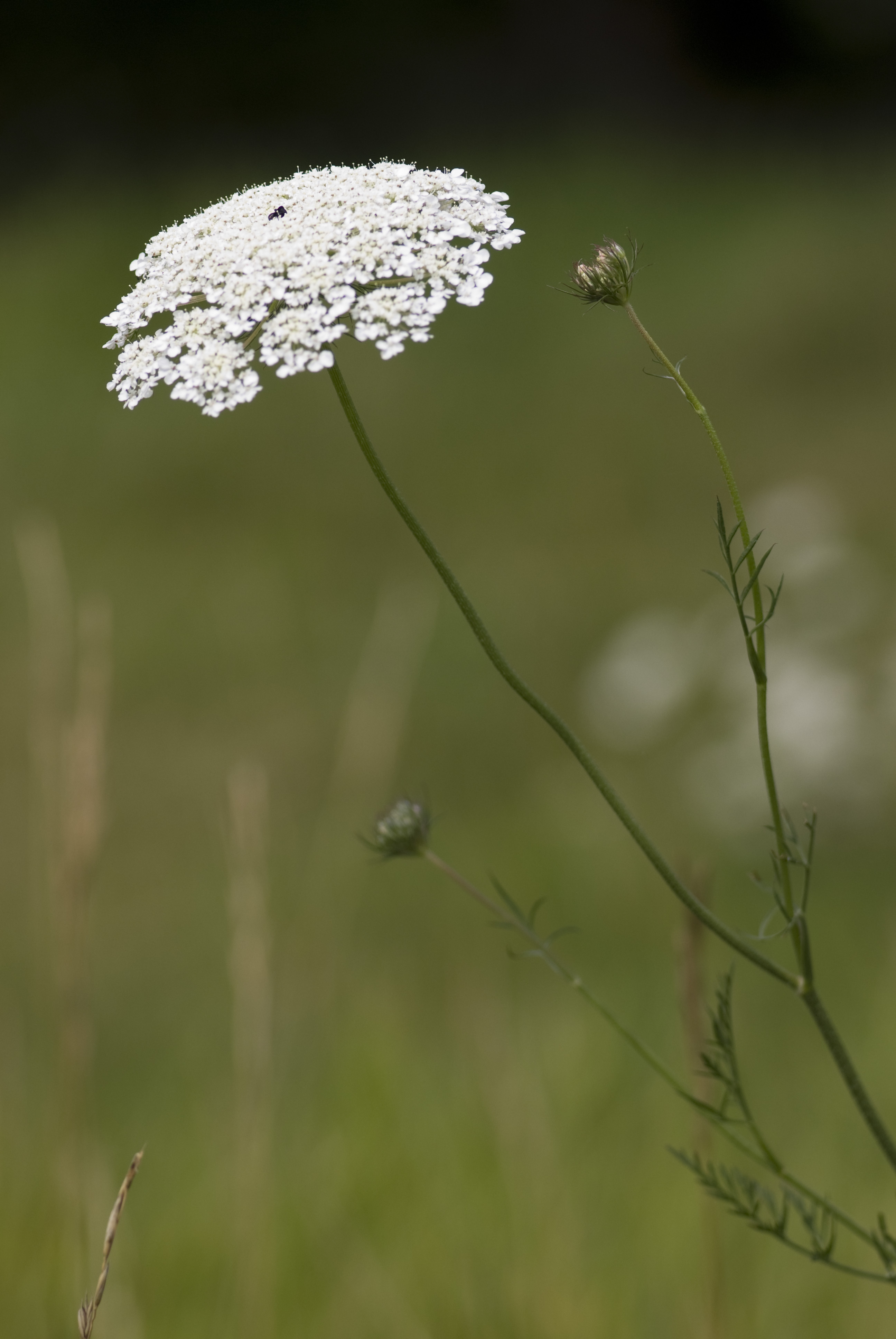 Daucus carota Bonneil (Aisne), France